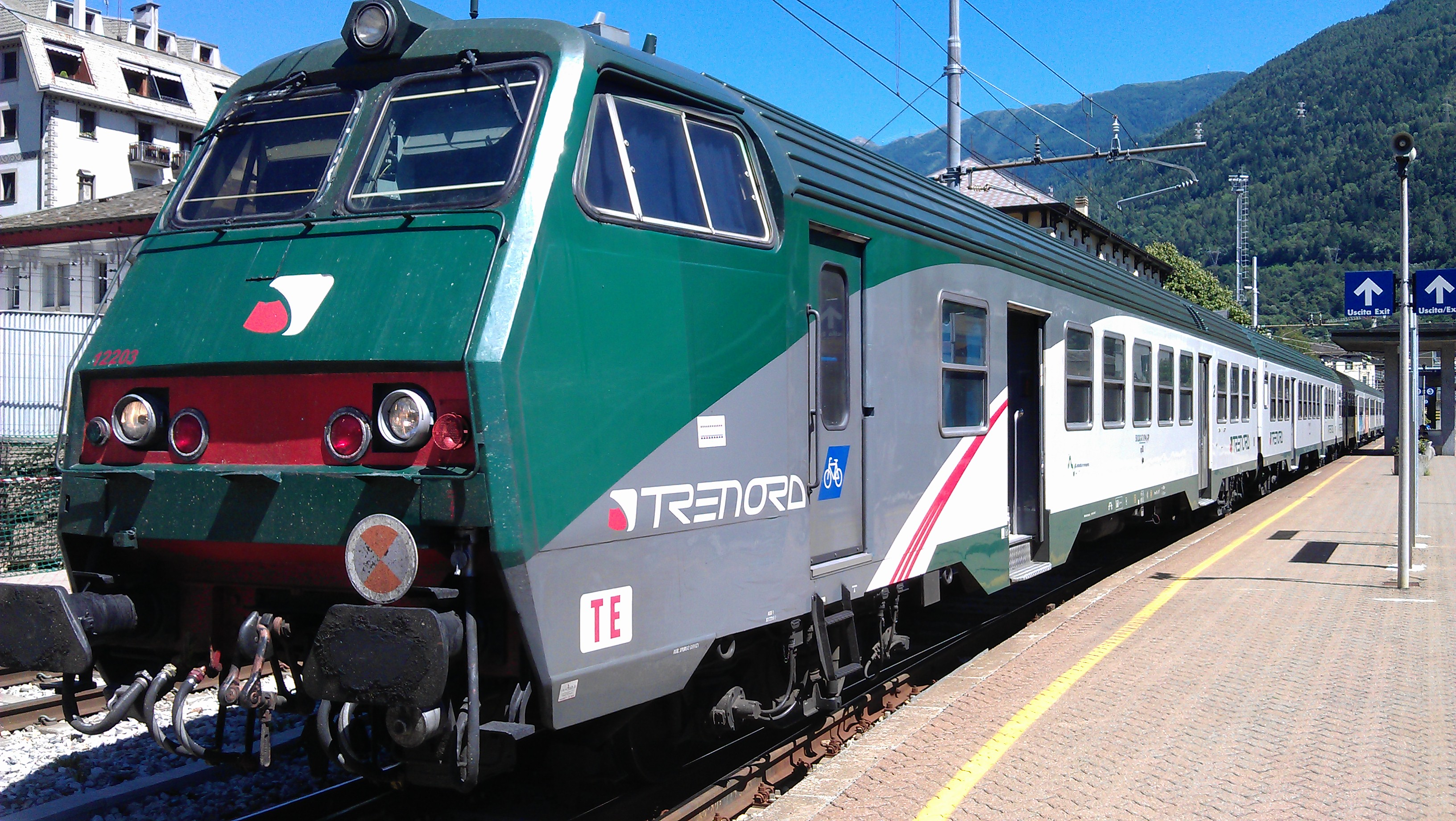 Pilota MD Mazinga livrea Trenord in sosta a Tirano.